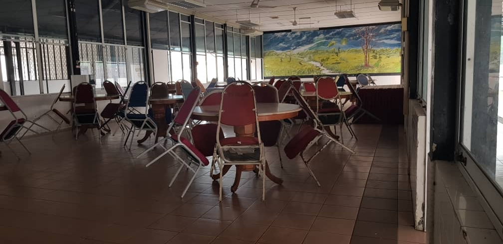 Dewan makan siti hajar 8 RRD (Para)